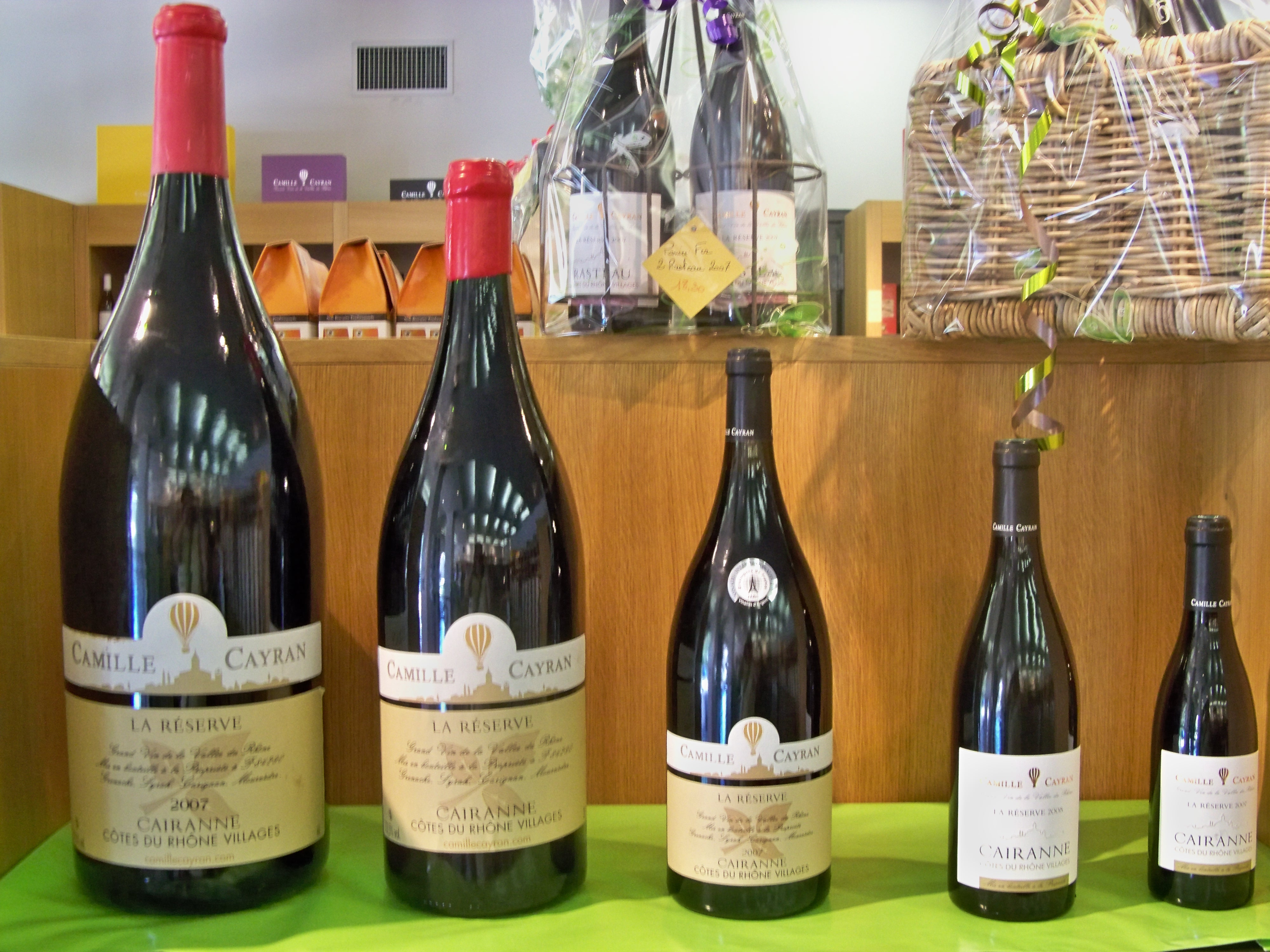 Bouteilles d'AOC Cairanne